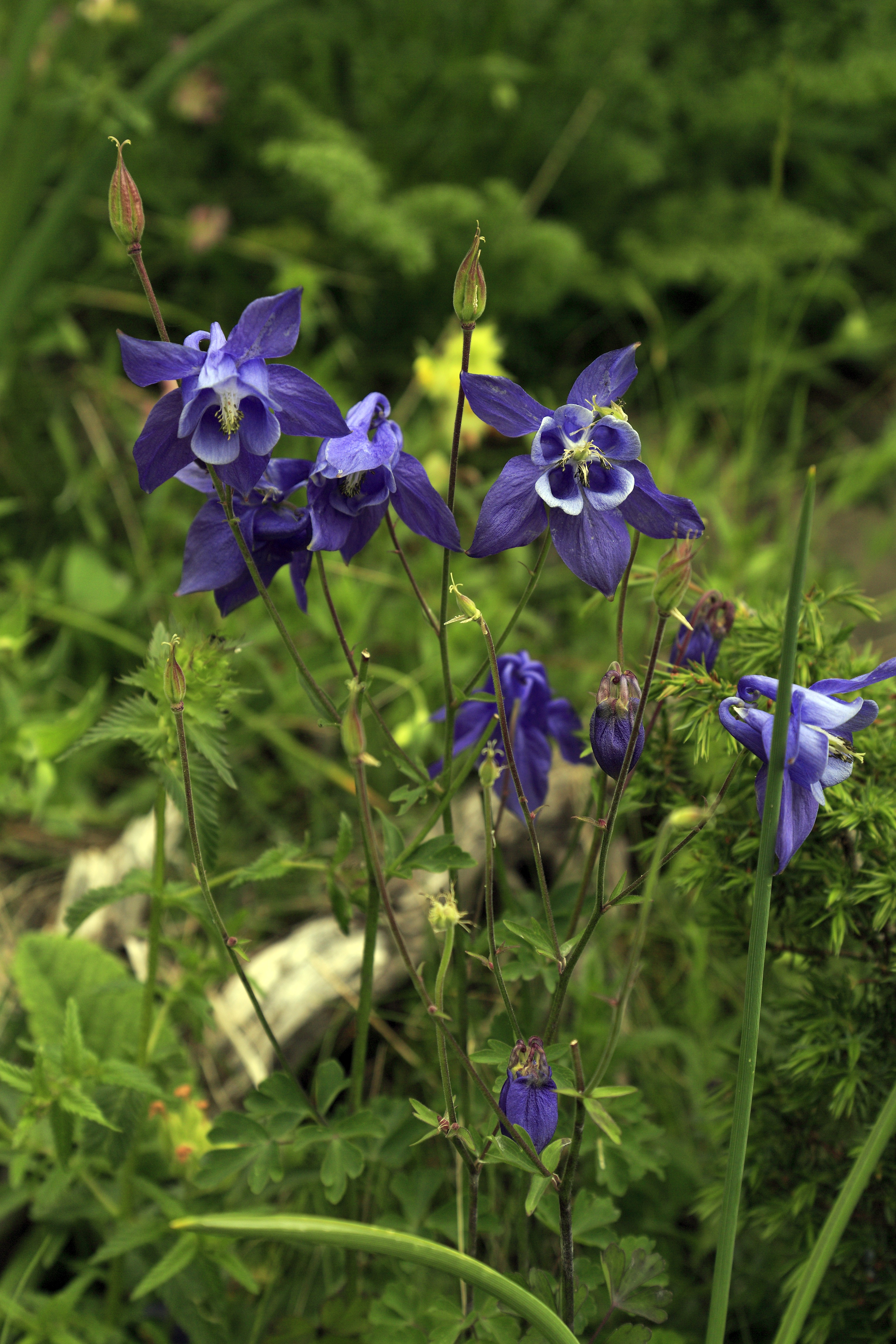 Aquilegia pyrenaica, Valle de Ordesa, Circo de Carriata unterhalb vom aus dem Tal markanten Bergsporn Tozal del Mallo